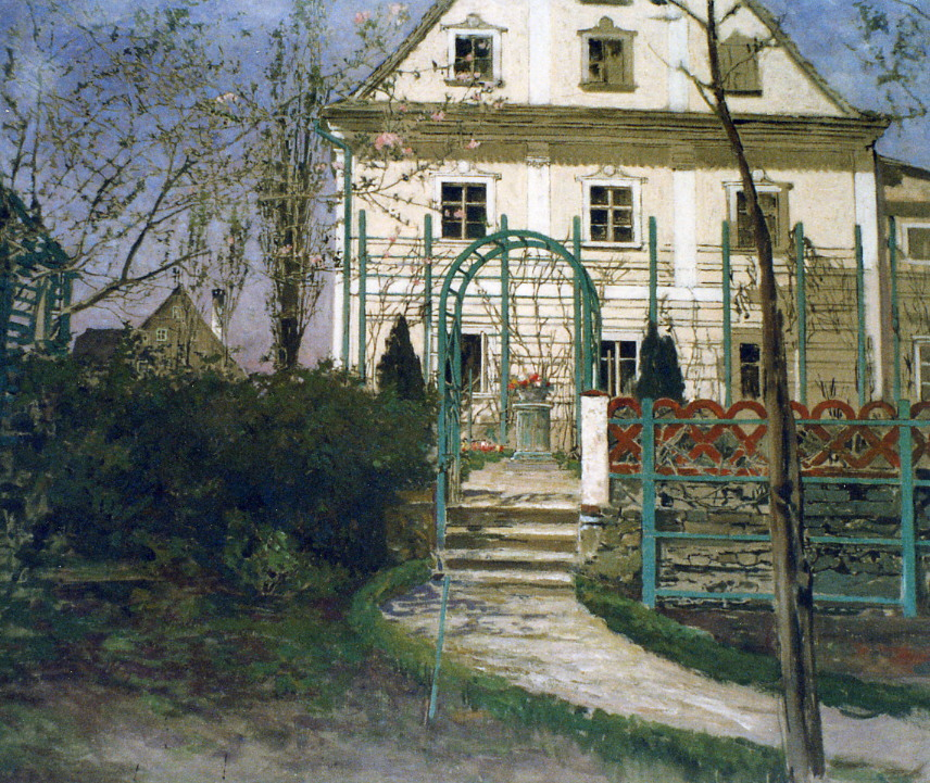 Hoeckerhaus-Gemälde von P. Hoecker